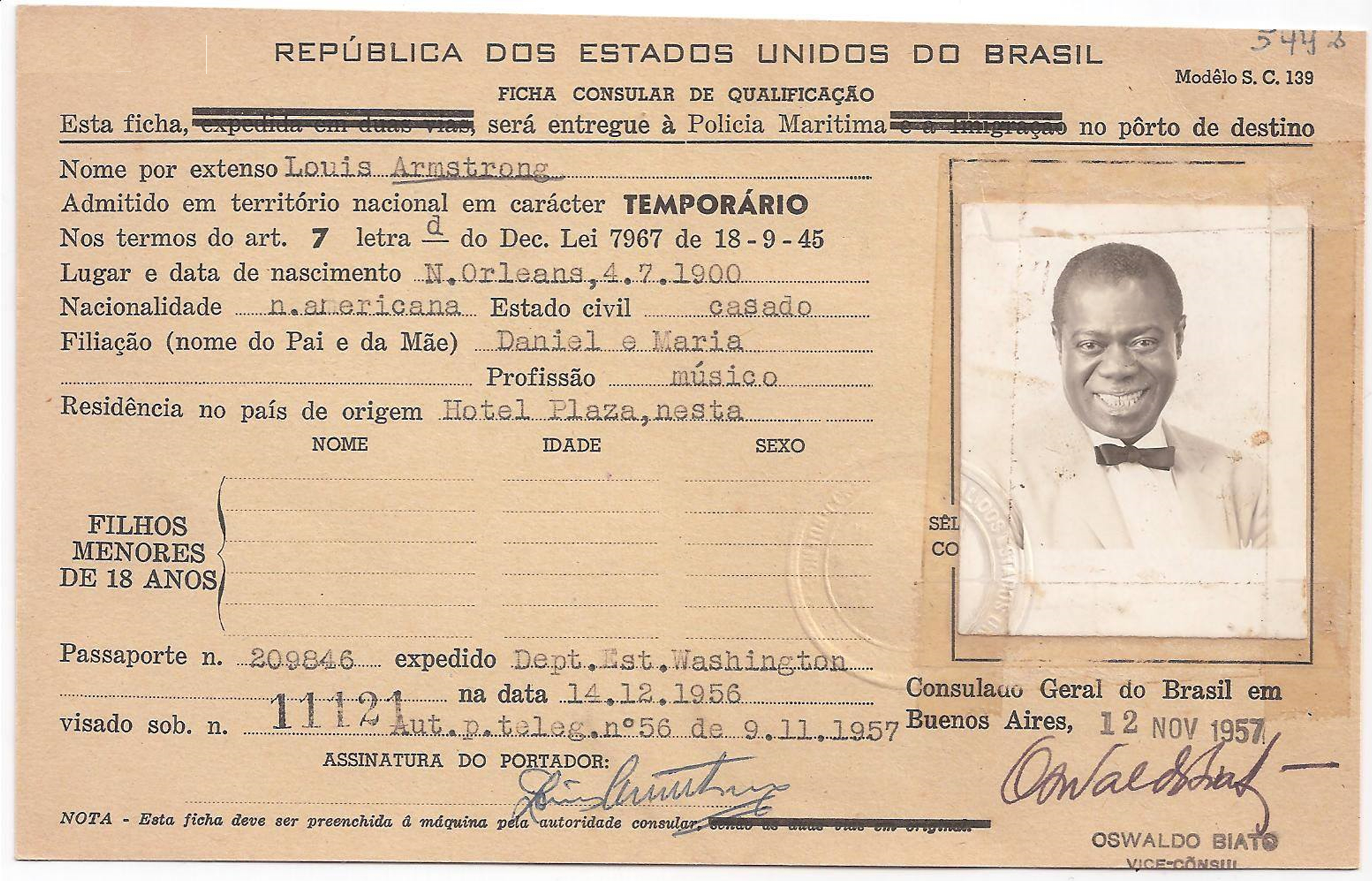 Ficha consular do cantor e instrumentista americano Louis Armstrong (1901-1971) em visita ao Brasil, em 1957, quando se encontrou pessoalmente com Pixinguinha (1897-1973). Fundo: Divisão de Polícia Marítima, Aérea e de Fronteiras (OL).